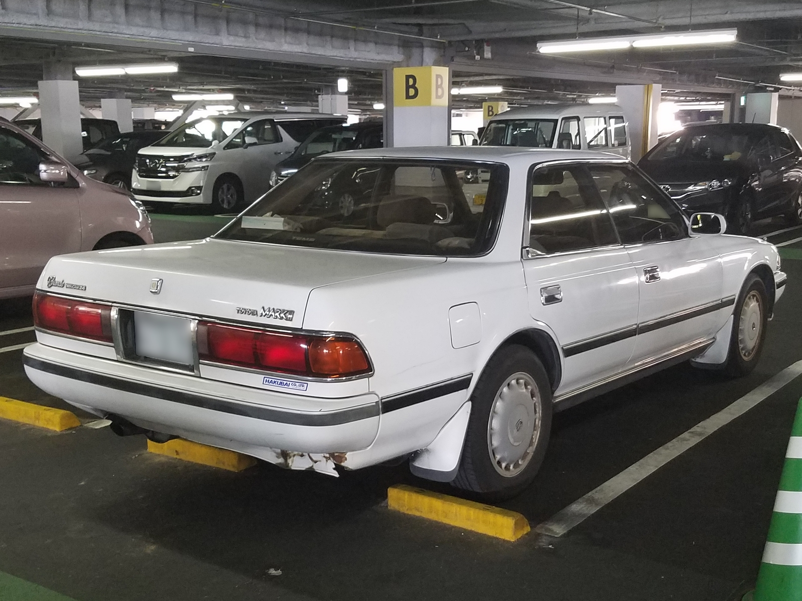 マークII グランデツインカム24（前期型）